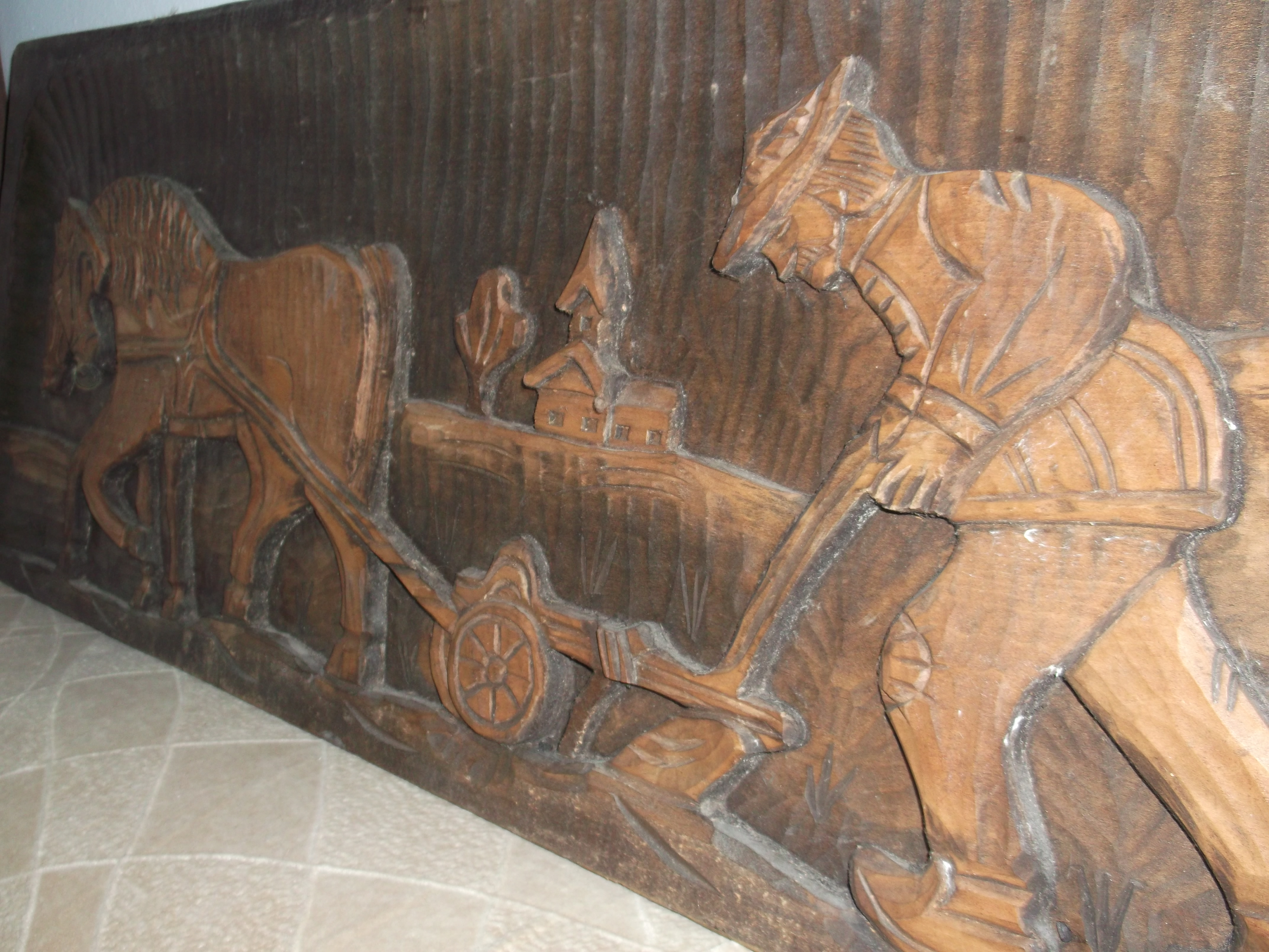 " La arat " , sculptura in lemn de tei de forma dreptunghiulara { 80 / 30cm. }, aflata in Aruncuta la Castelul din Rupturi si luata drept " suvenir" de un satean , odata cu fuga grofului .